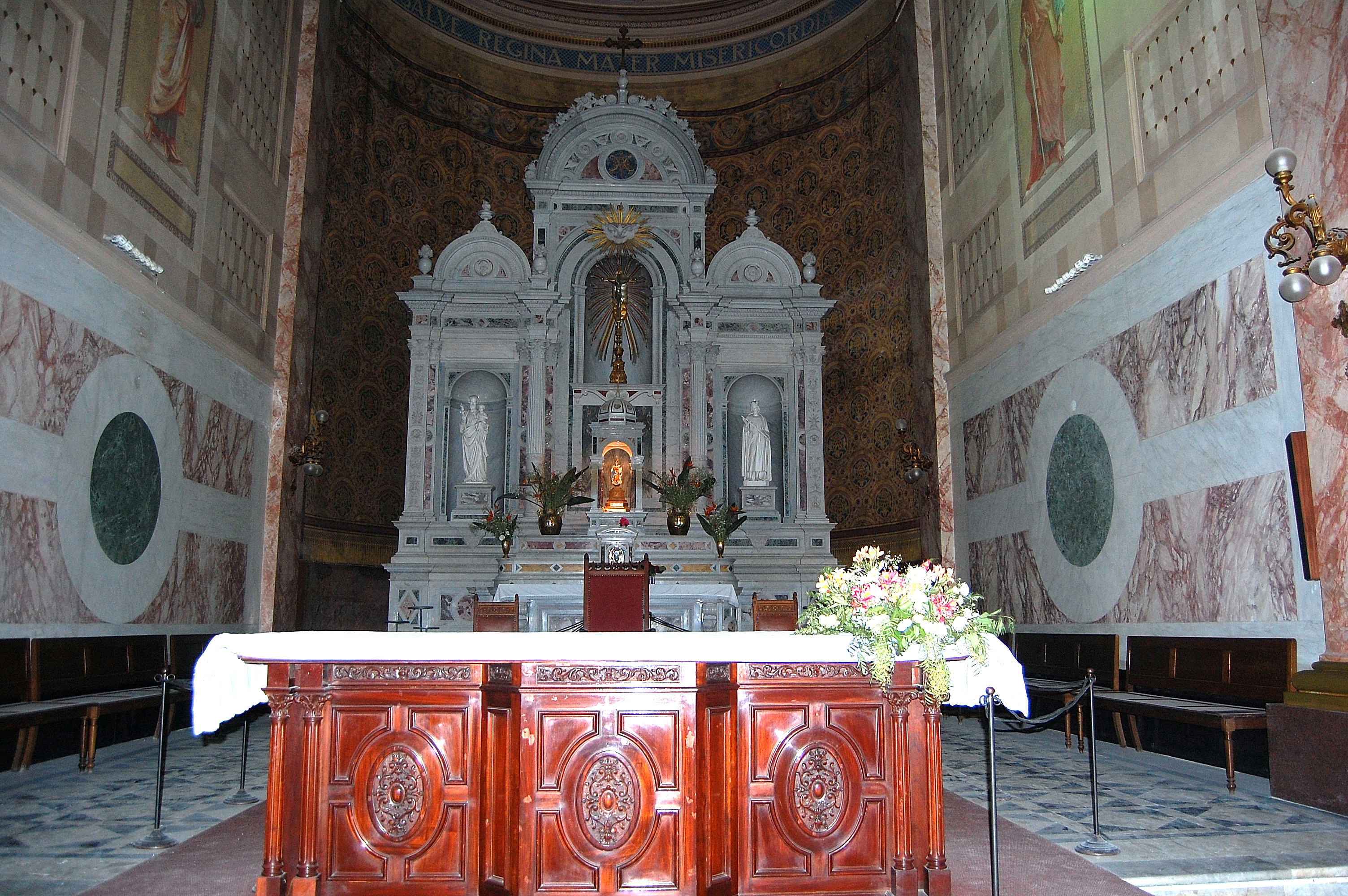 Se puede apreciar el altar mayor, así como parte de los muros interiores de la Catedral de la ciudad de Florida